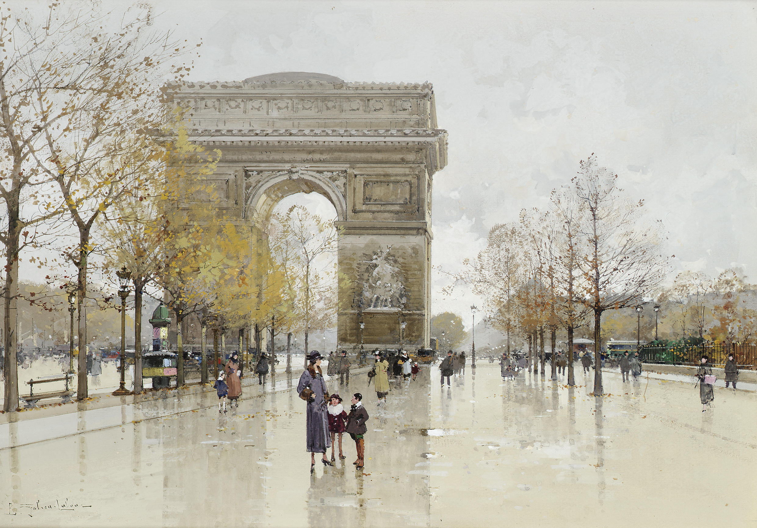 L'Arc de Triomphe, Paris.